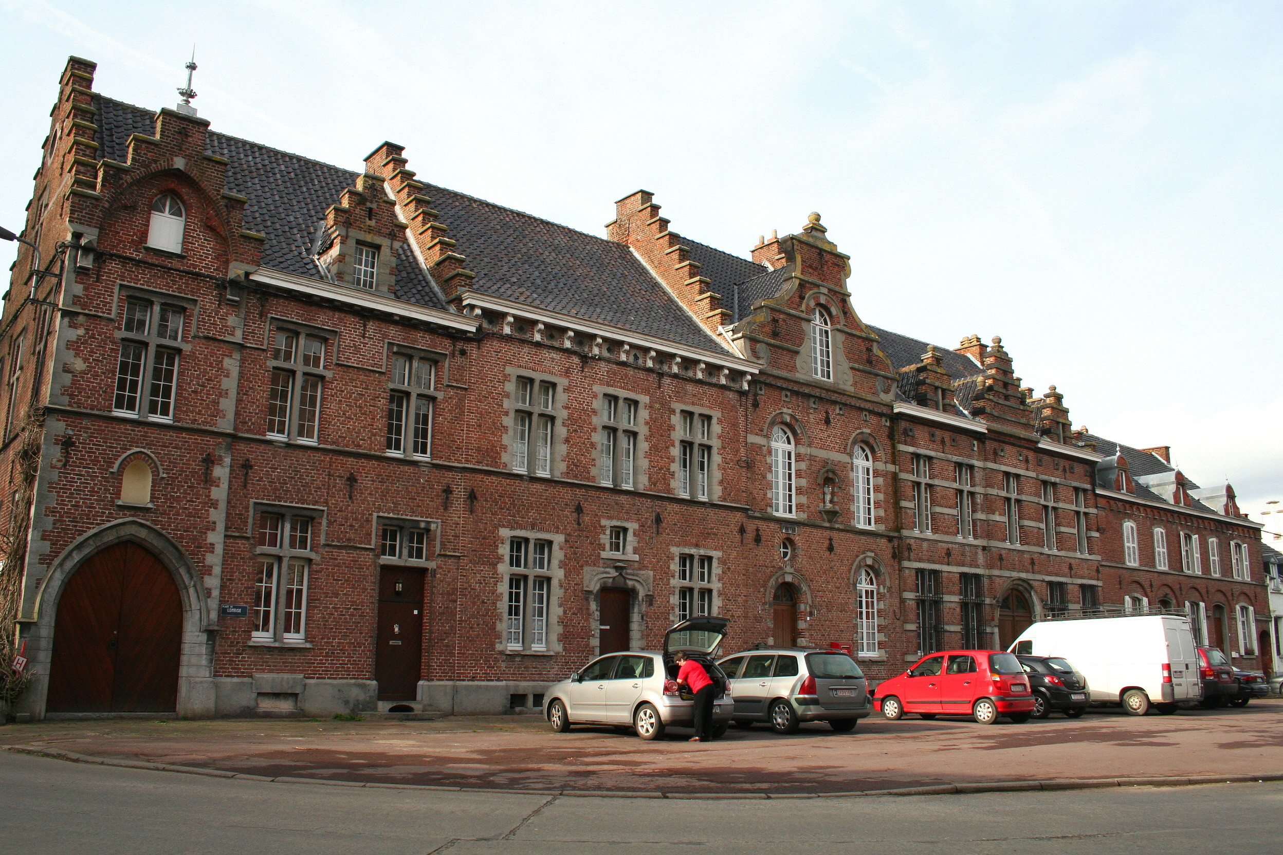 Lombise (Belgique), Place de Lombise (XIXe siècle).